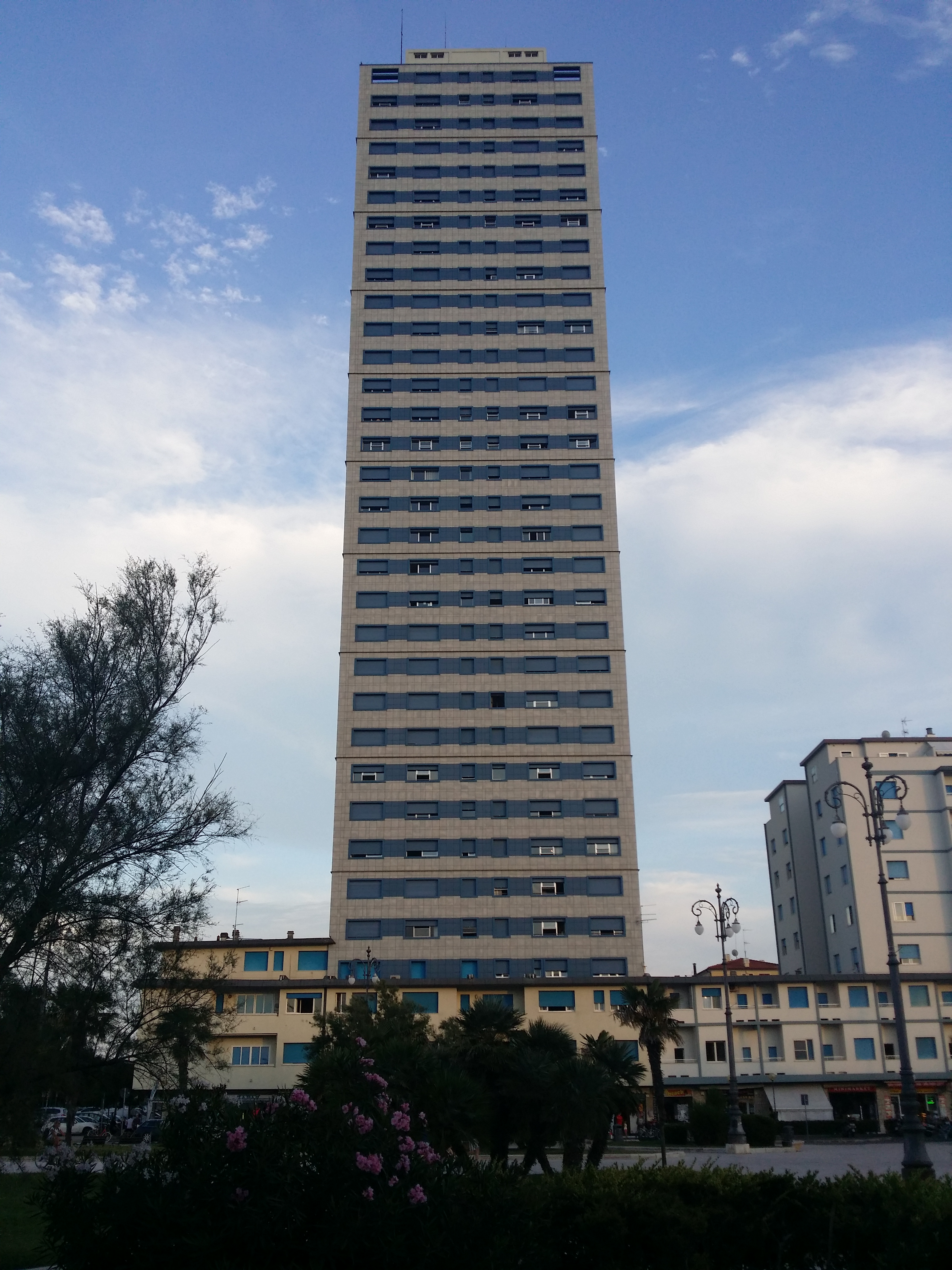 Grattacielo di Cesenatico, 22.8.14